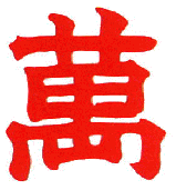 Вань фамилия